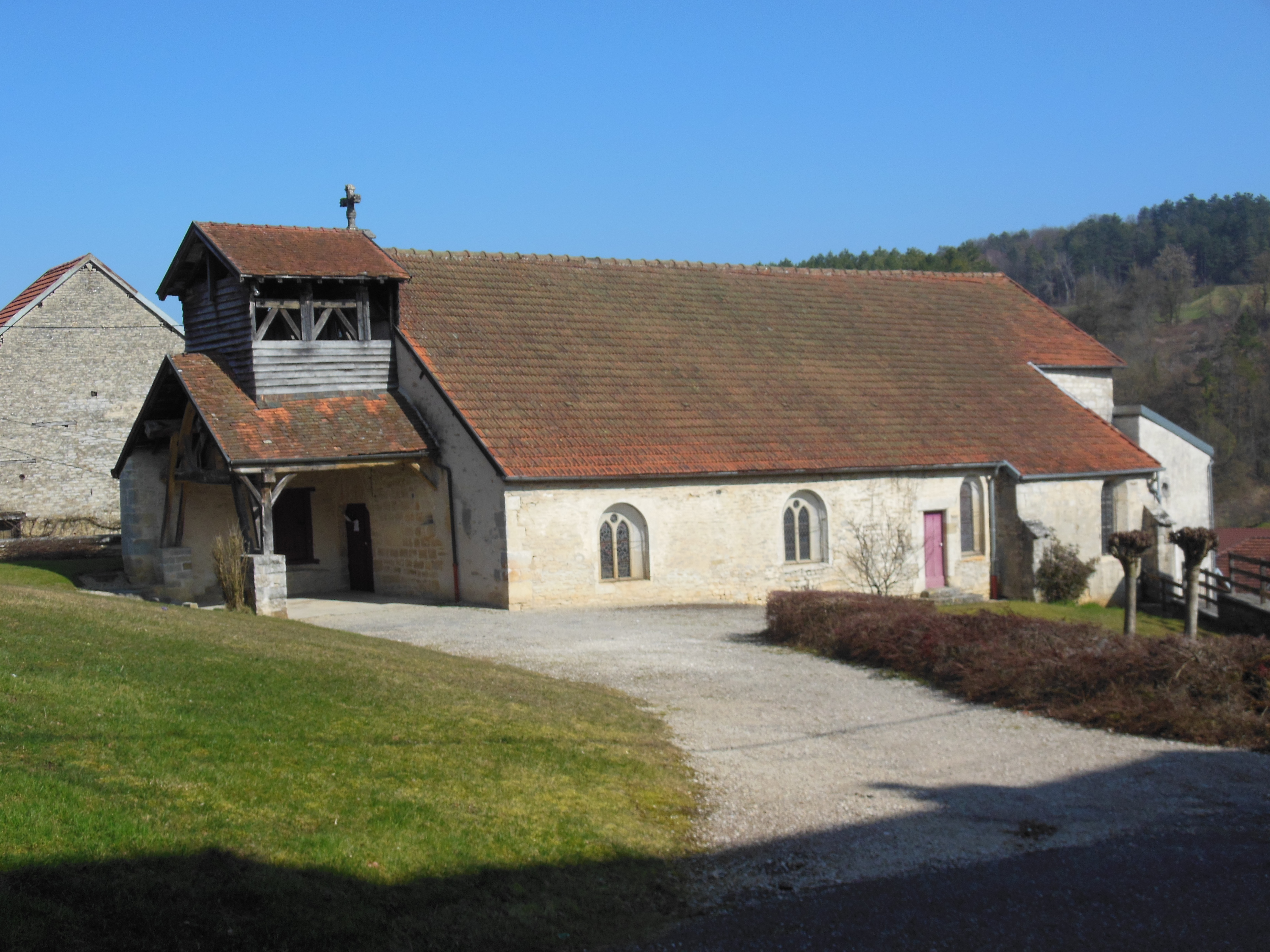 Photographie de l'église Saint-Mammès, à Rivière-les-Fosses (Haute-Marne).